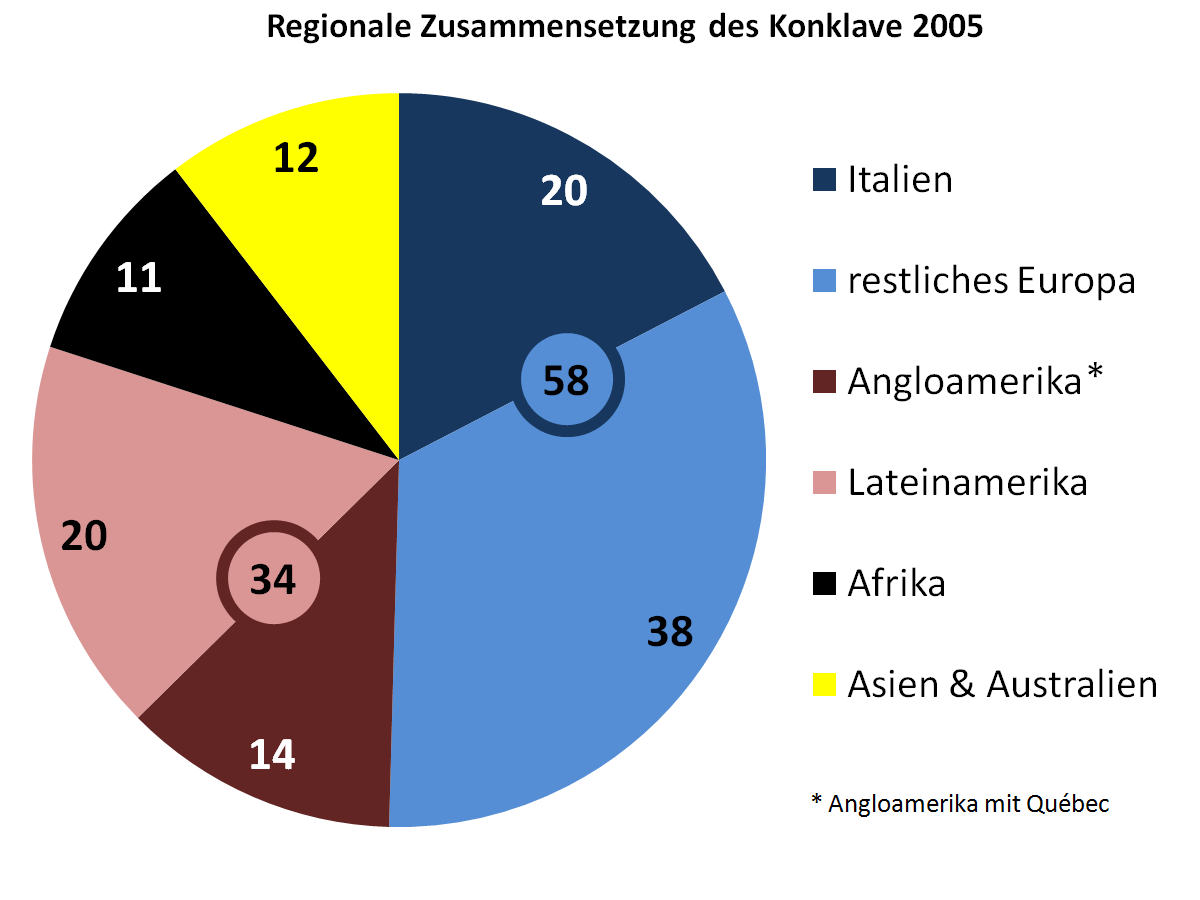 Zusammensetzung der Konklave nach Kontinenten. Italien gesondert angegeben. Anglo- und Lateinamerika gesondert angegeben. Summen von Europa und den Amerikas angegeben. Ozeanien als ein Teil Asiens betrachtet; Neuseeland als Teil des Australischen Kontinentes. Asien und Australien sind gemeinsam angegeben. Farben der Kontinente orientieren sich an der ursprünglichen Definition der Farben der Olympischen Ringe.